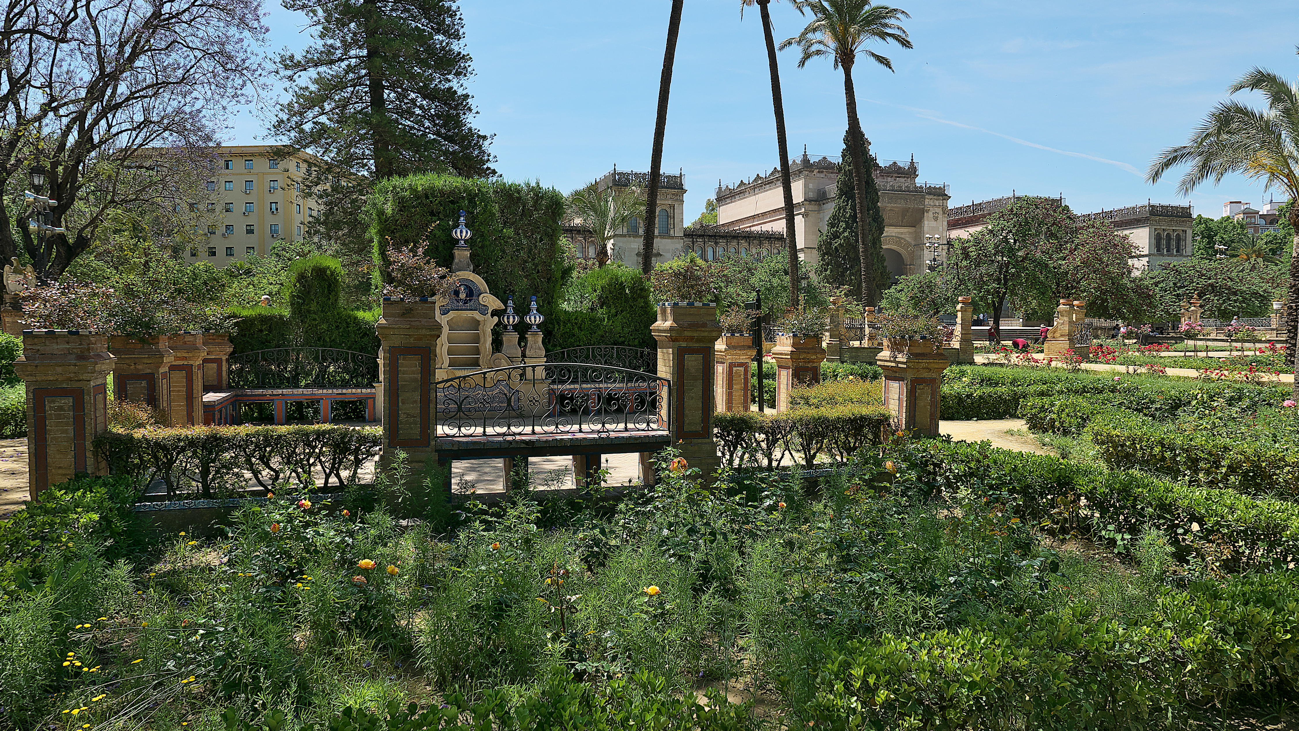 Parque de María Luisa. La Exposición Iberoamericana de Sevilla a Rodríguez Marín.